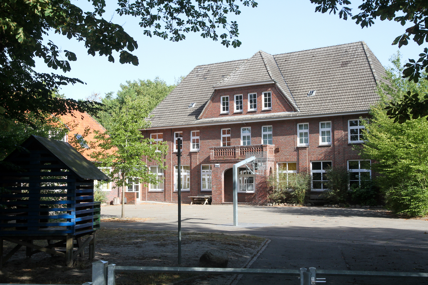 Gebäude der geschlossenen Grundschule Borgstede